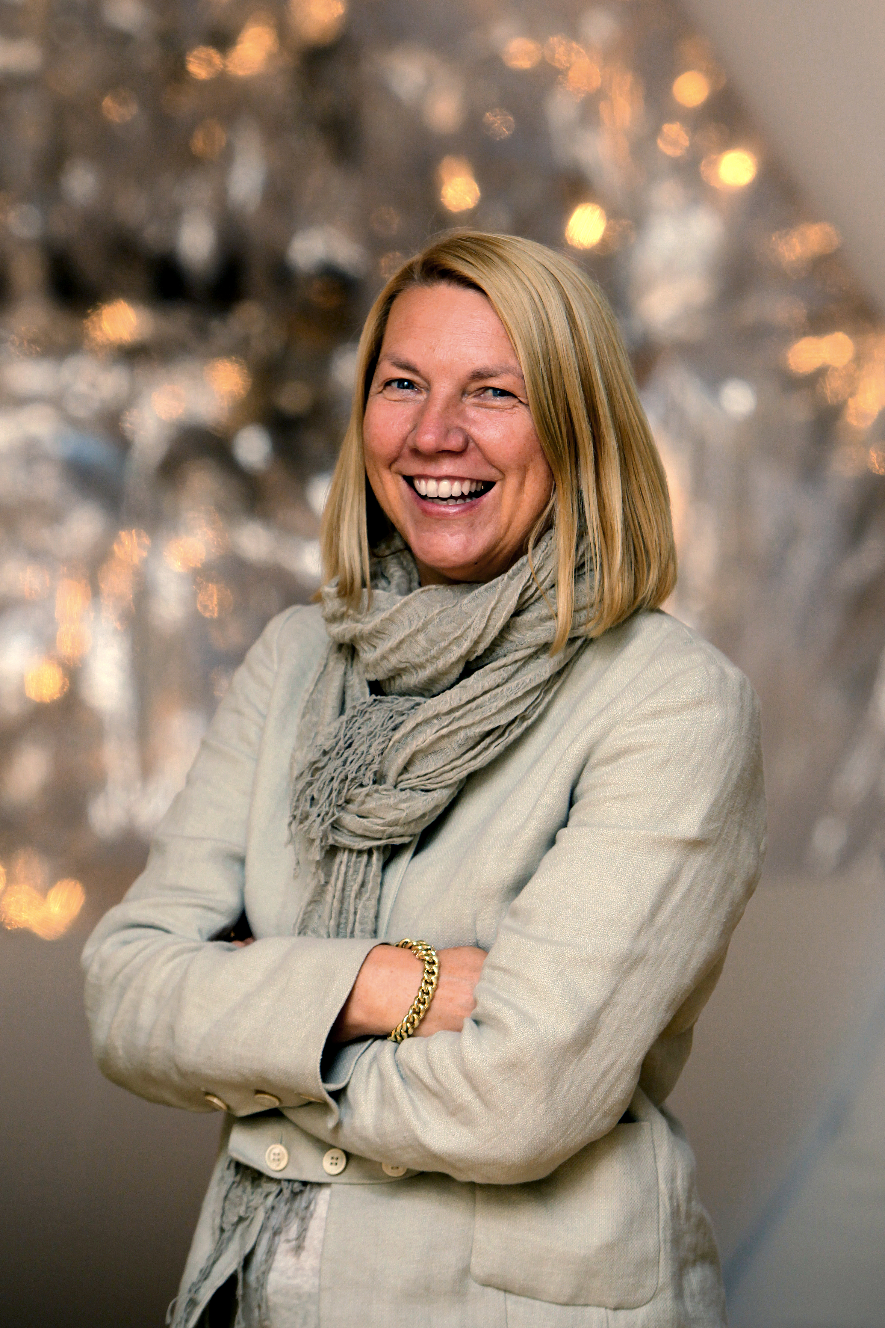 Prof. Dr. Sabine Schulze, Direktorin des Museums für Kunst und Gewerbe Hamburg